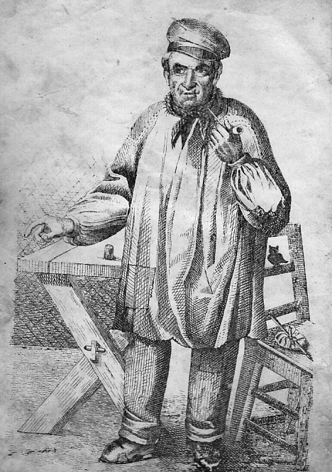 Zeichnung des Bergisch Gladbacher Originals Tobias von Hebborn